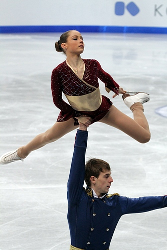 Юлия Лаврентьева и Юрий Рудык (Украина) на чемпионате мира по фигурному катанию среди юниоров 2012